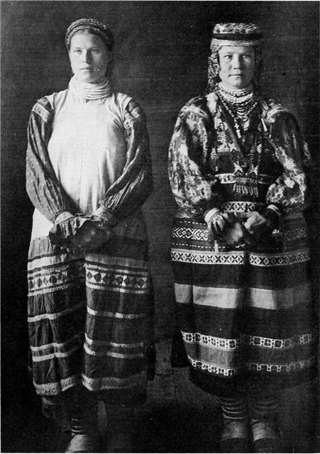 Замужние женщины в праздничных костюмах. 1908 г. Орловская губерния